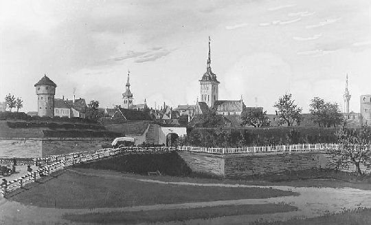 Tallinna linnamüüri Harju värav, 19. sajandi I pool.